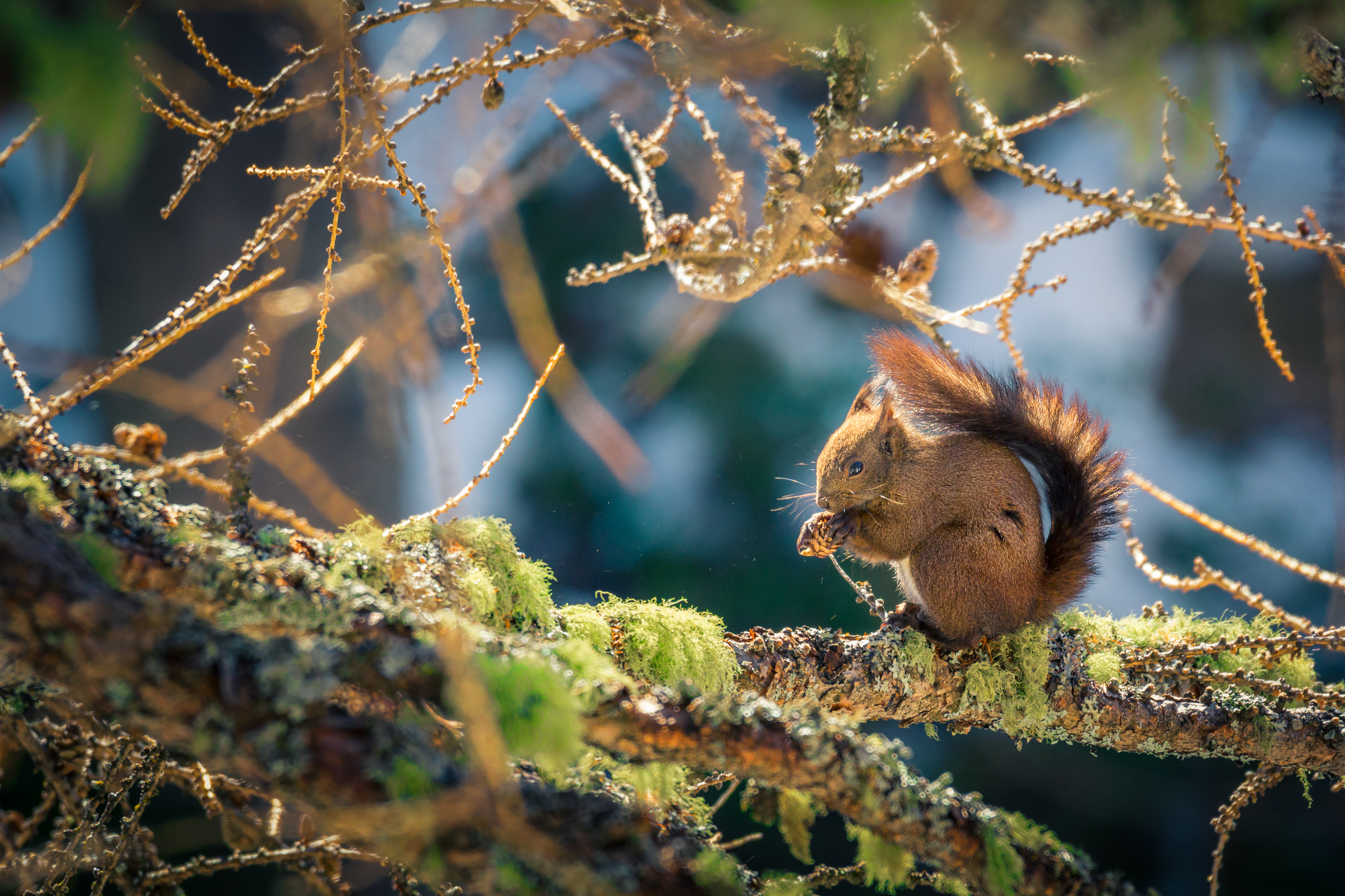 Foto scattata nei pressi di Ceresole Reale, Piemonte. Uno scoiattolo rosso si ciba di una pigna al sicuro tra i rami di un larice.